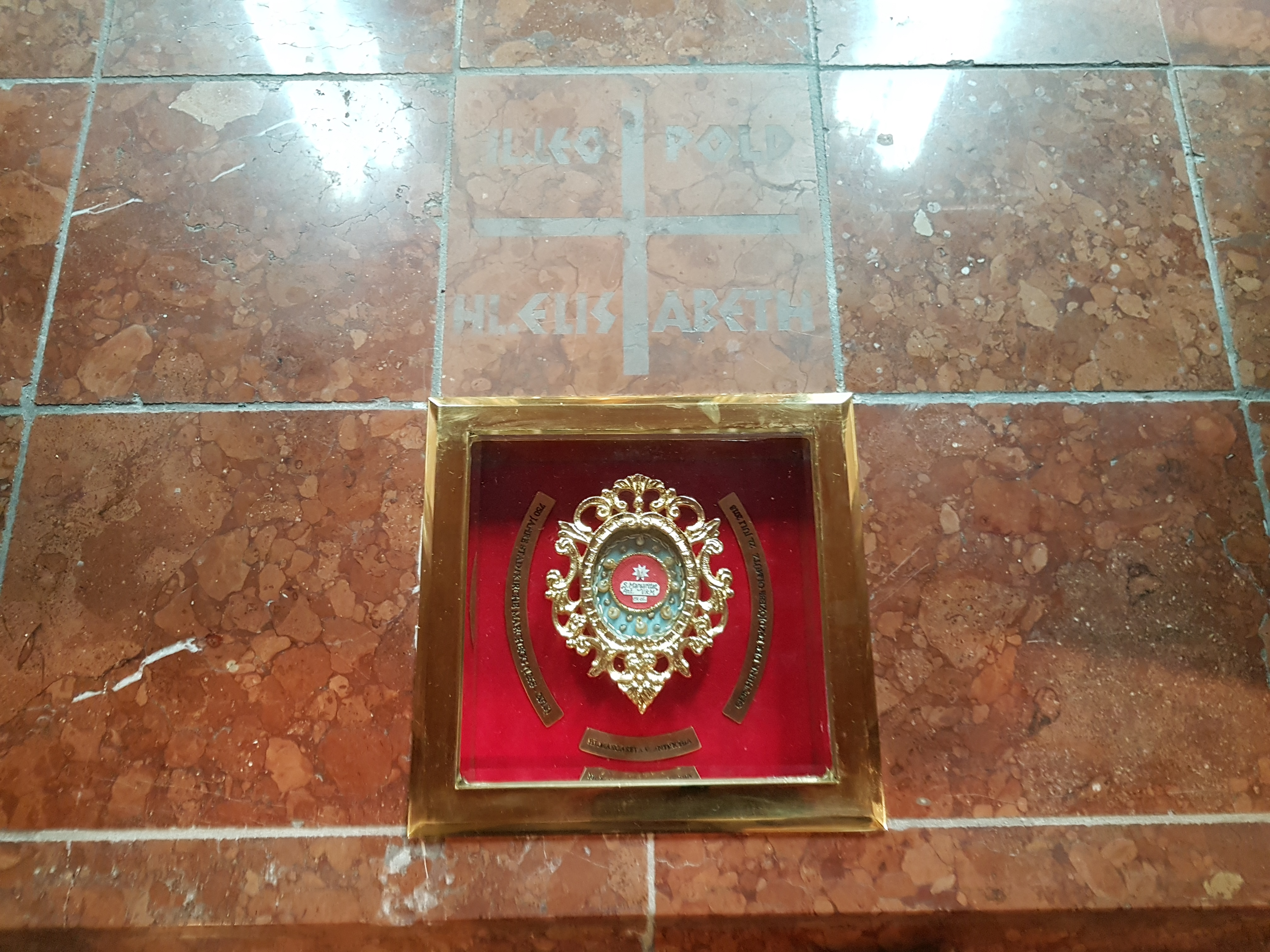 Relikvie sv. Markéty Antiochijské v Marcheggu, umístěná mezi podlahu a oltář.